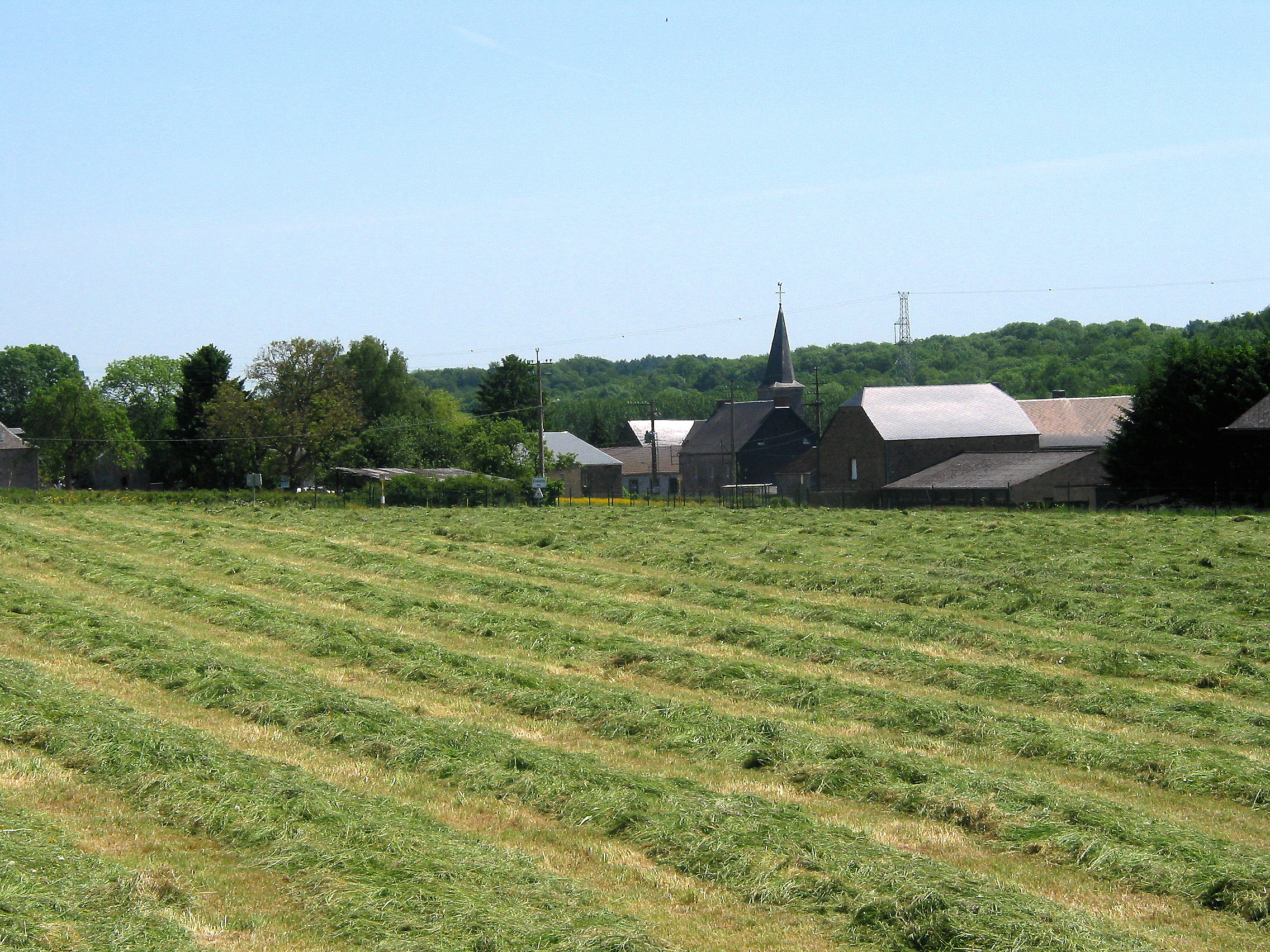 Evelette Belgique, le village viu de la route d'Ohey. Walon: Év'lète (Bèljike), li viyadje vèyu dispôy li vôye d'Ohè.